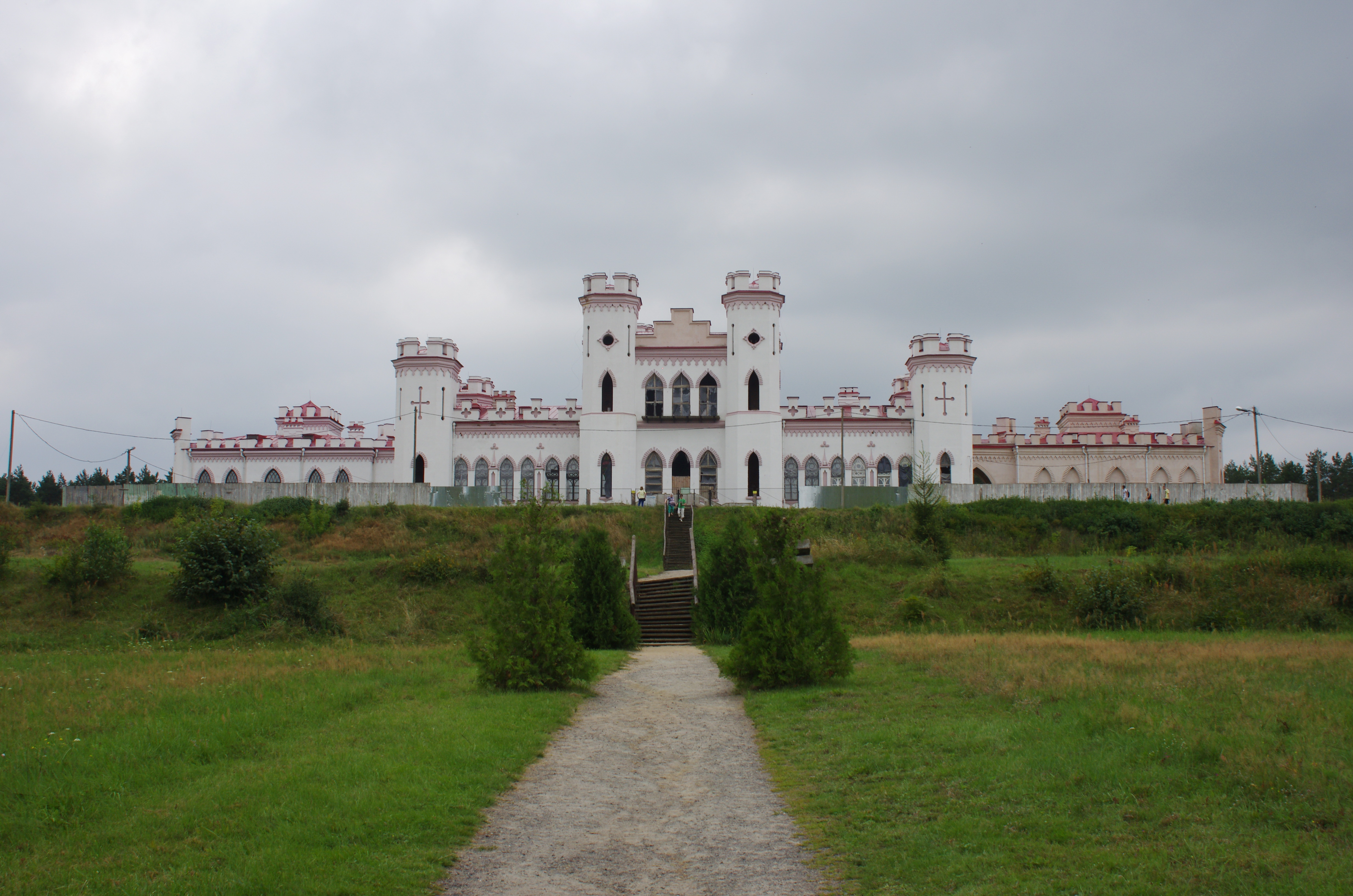 Палац Пуслоўскіх